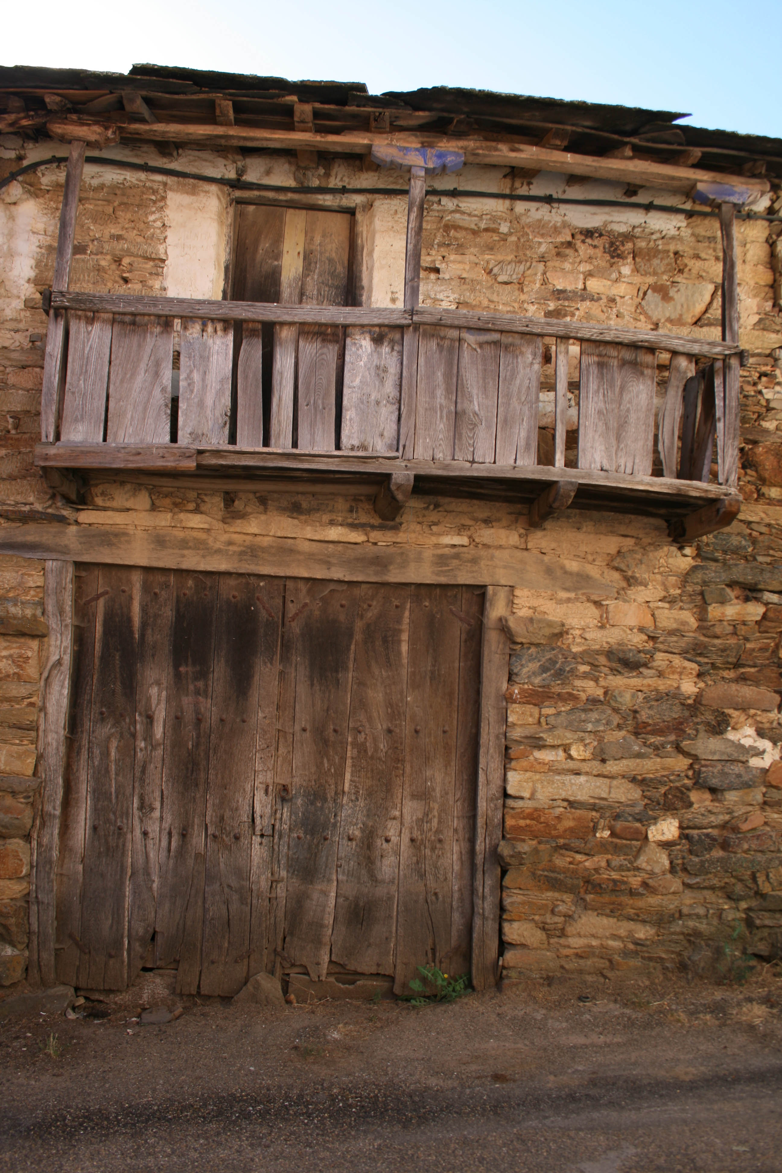 Detalles de la arquitectura típica de la Comarca de Aliste (Pobladura de Aliste)